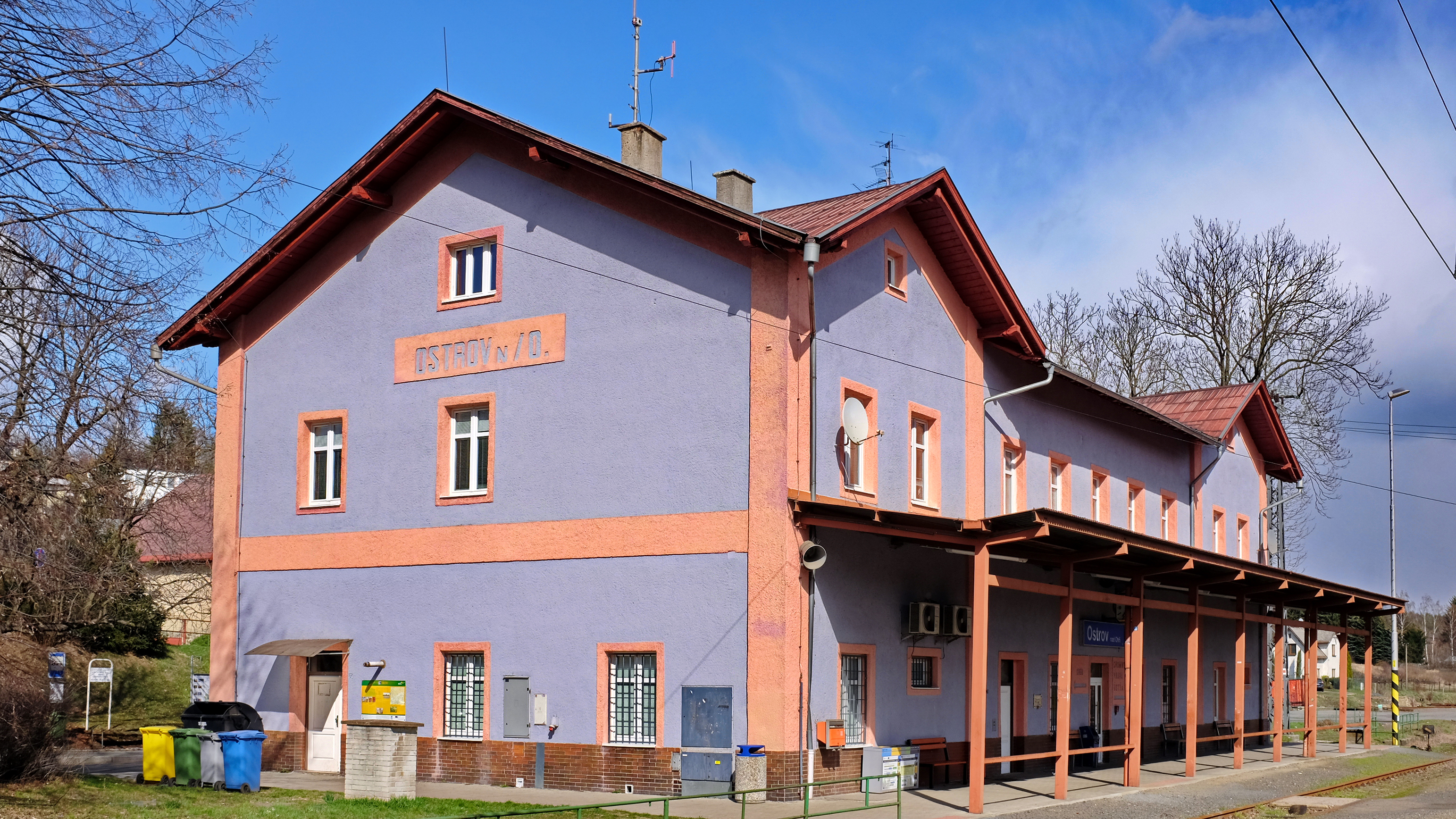 Ostrov nad Ohří, vlakové nádraží, okres Karlovy Vary